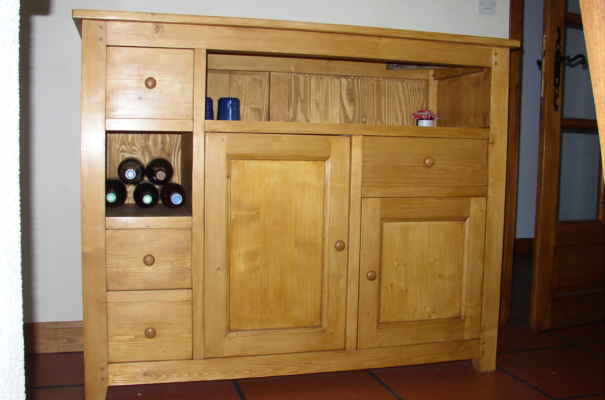 appareil photo olympus 3 Mpixel auteur Daniel Duron (kinou)